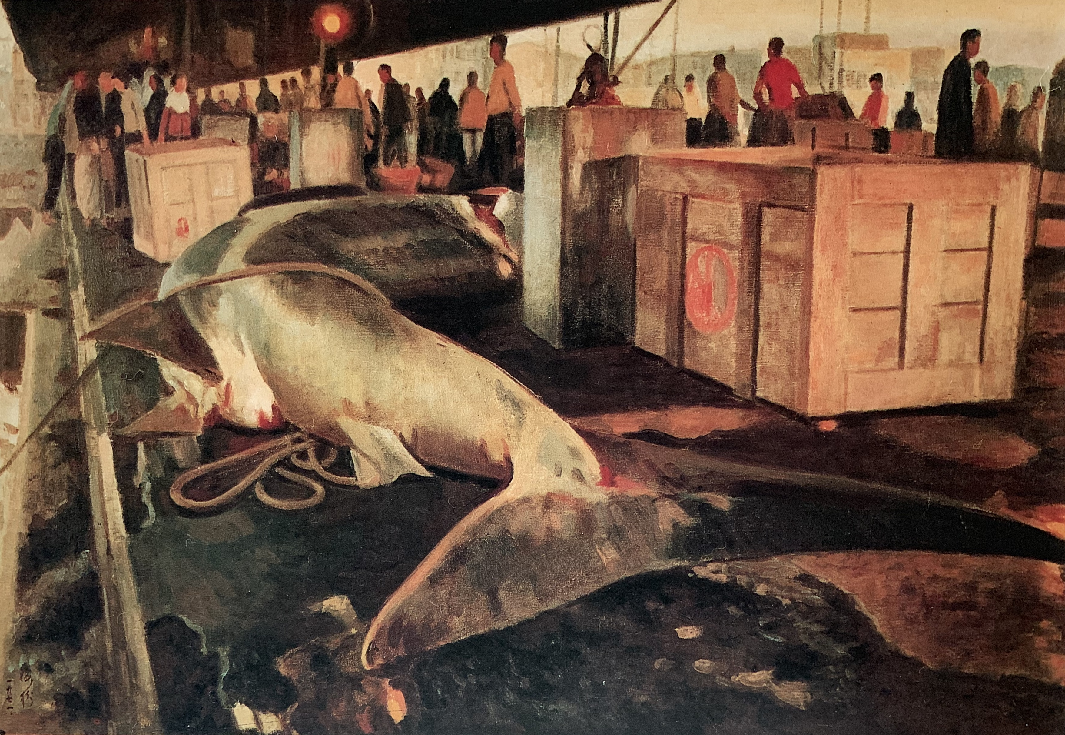 中文（台灣）: 澎湖魚市；李梅樹，1971；油彩，畫布，80xc116.5m 50P。 澎湖的旅行取景魚市，很大的鯊魚佔據大半圖面，木箱和所有市場內細小的人物，造成強調大魚並未引起騷動，也可能是經常捕獲豐富的現象。